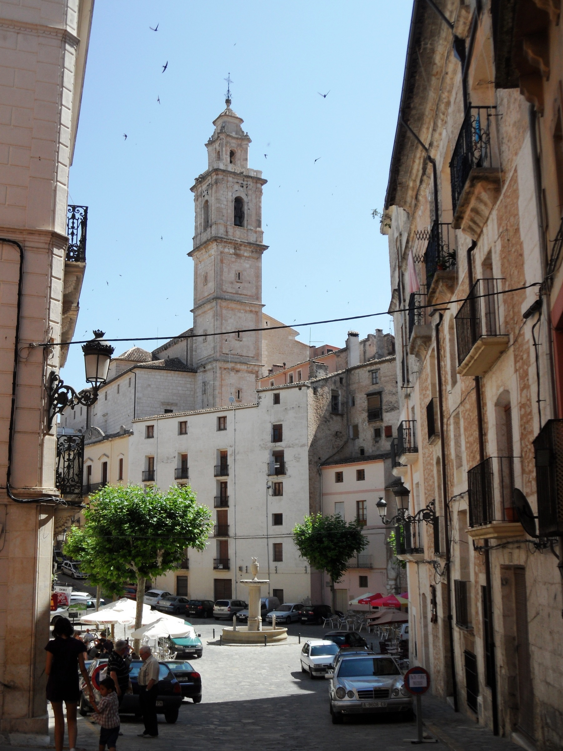 Plaça de l'Ajuntament de Bocairent.